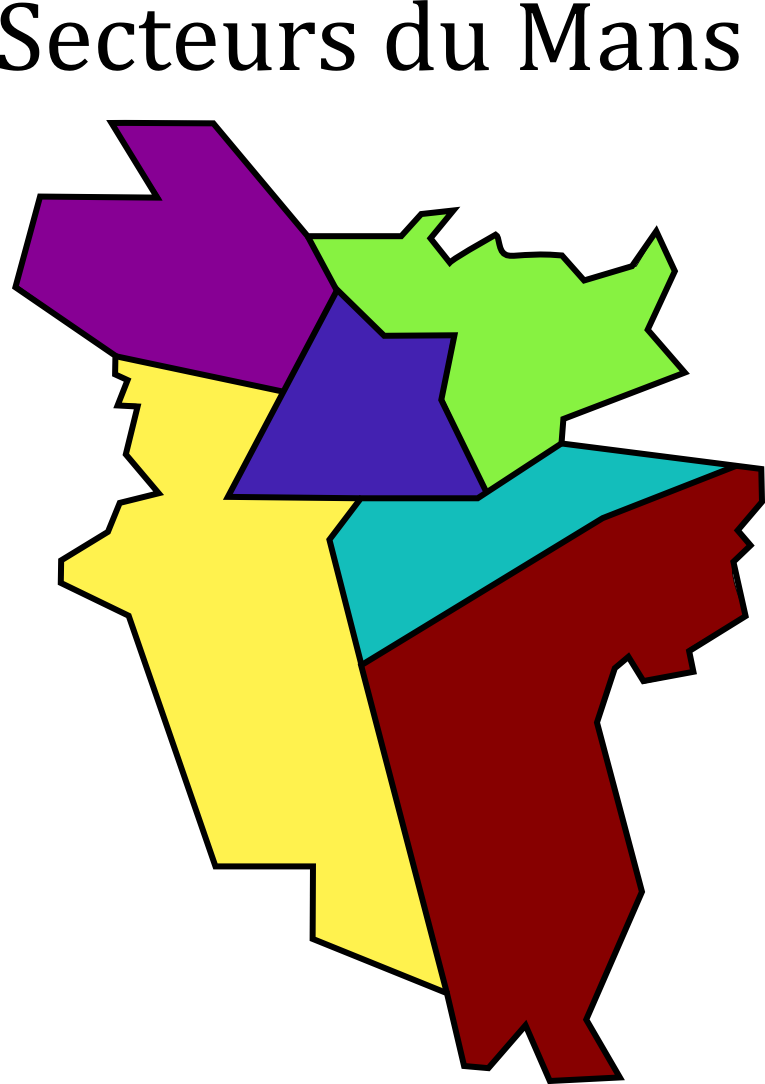 Secteurs de la ville française du Mans